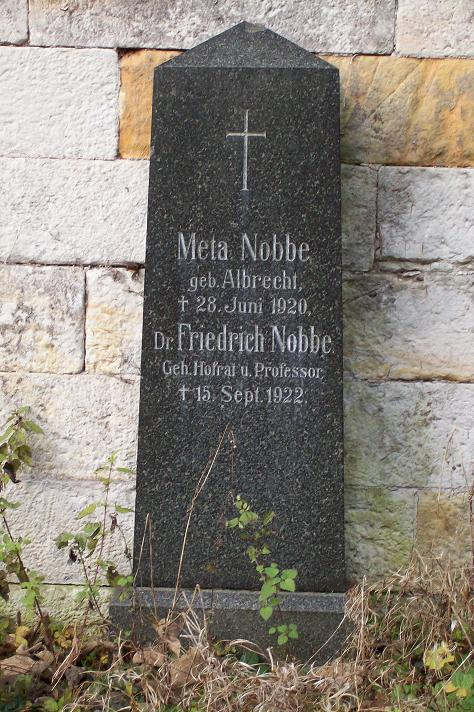 Grabstein Fam. Nobbe auf diem Friedhof Tharandt